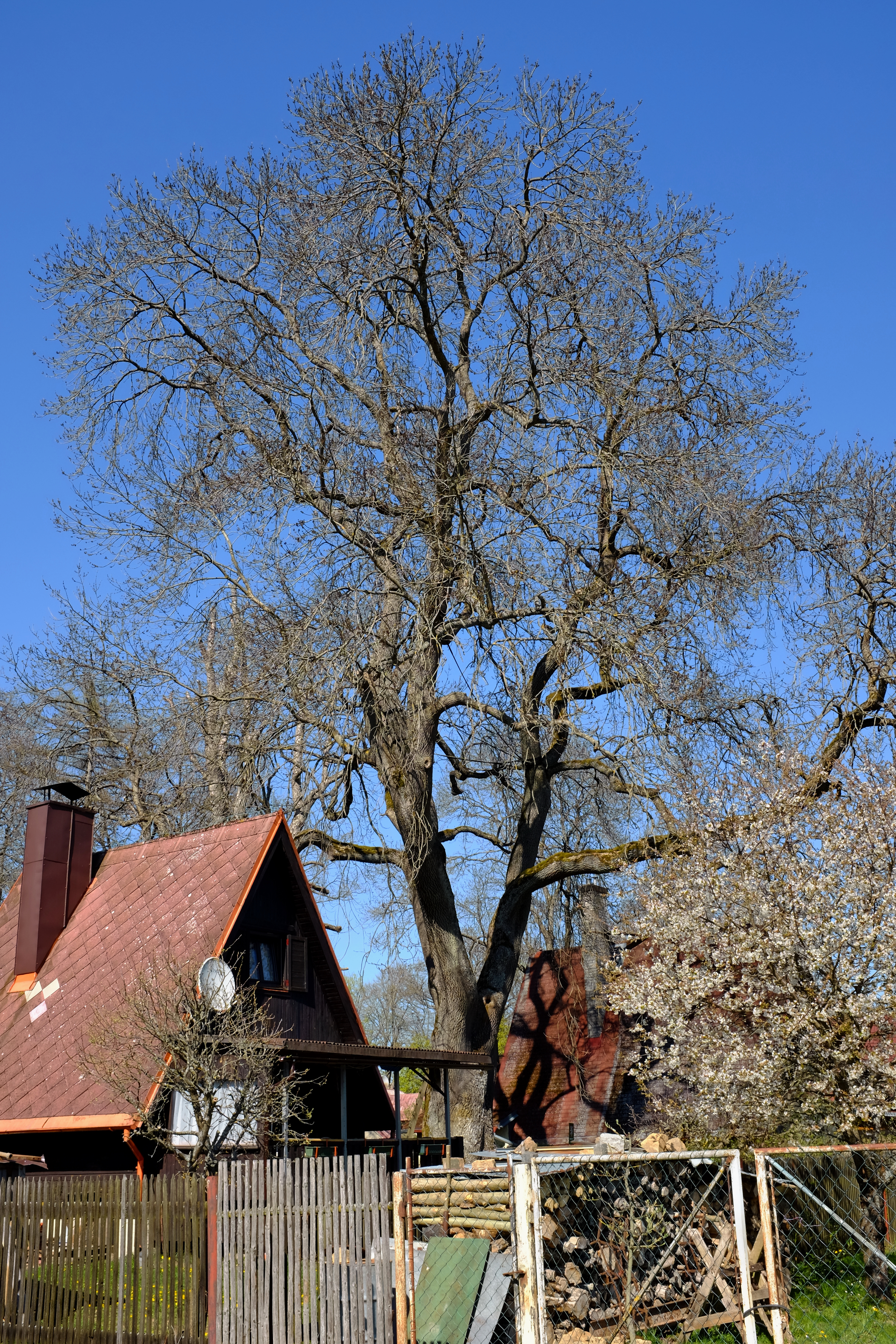 Památný strom - Jasan u Čadilů - Chodovská Huť, část obce Tři Sekery, okres Cheb